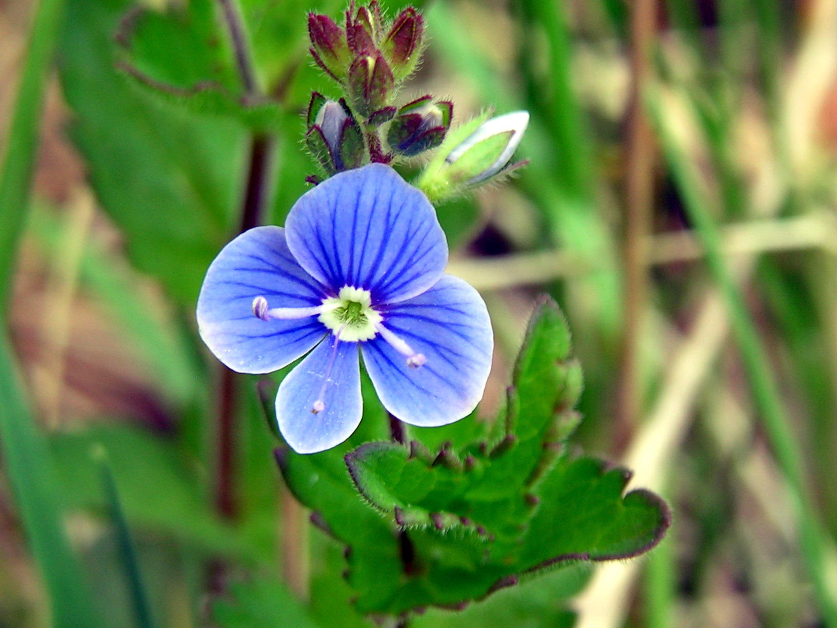 Paprastoji veronika (Veronica chamaedrys), žiedas Šeima. Gyslotiniai (Plantaginaceae) Foto: Algirdas, 2006 m. gegužės 27 d., Lietuva